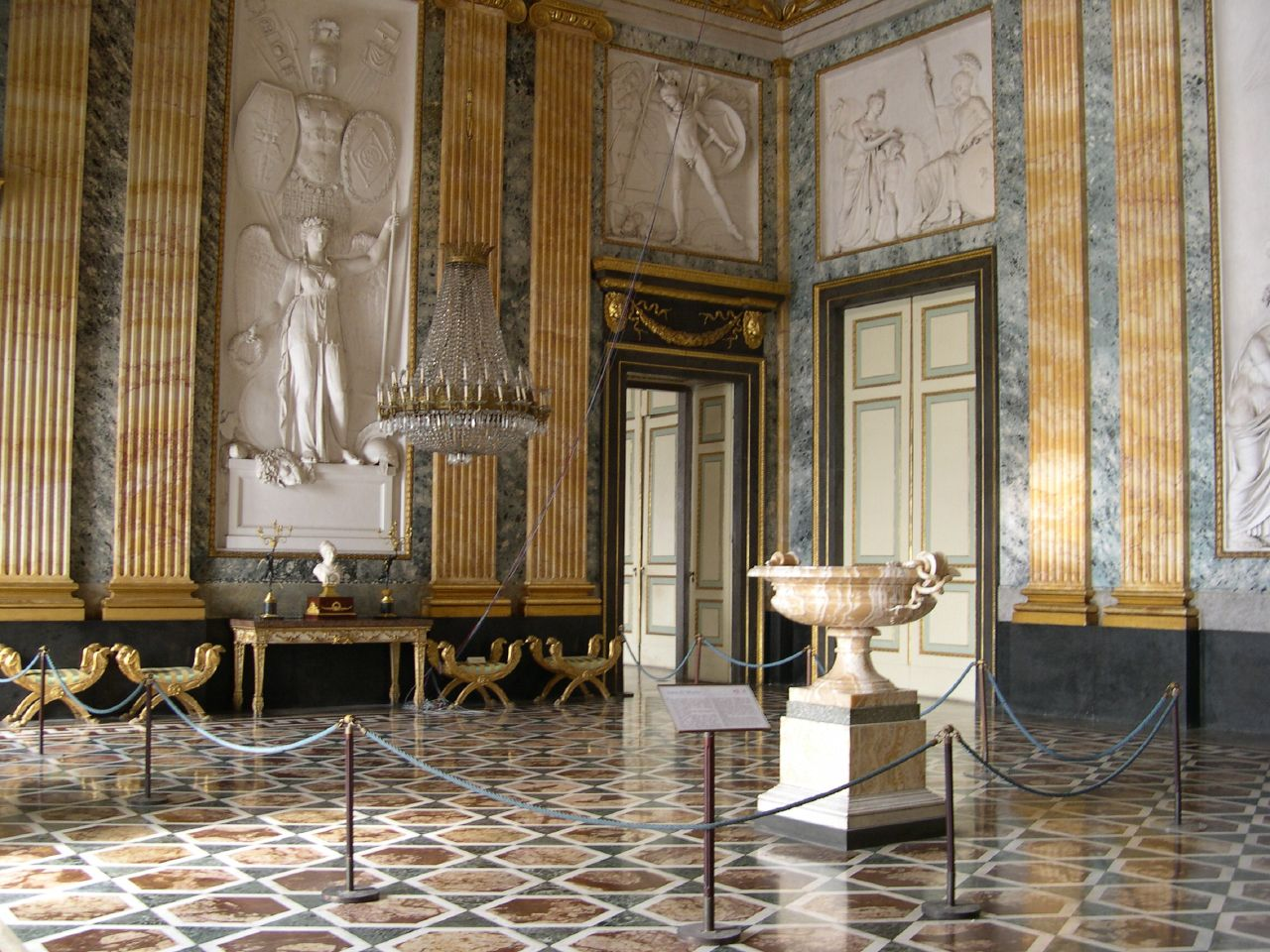 Saal des Mars im Königspalast von Caserta